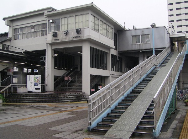 West Exit of Isogo Station, Negishi Line, Isogo-ku, Yokohama, Kanagawa, Japan (:)